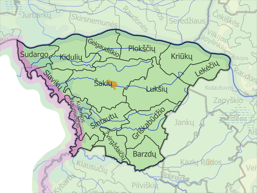 Padaryta iš :image:LietuvosSeniunijos.png